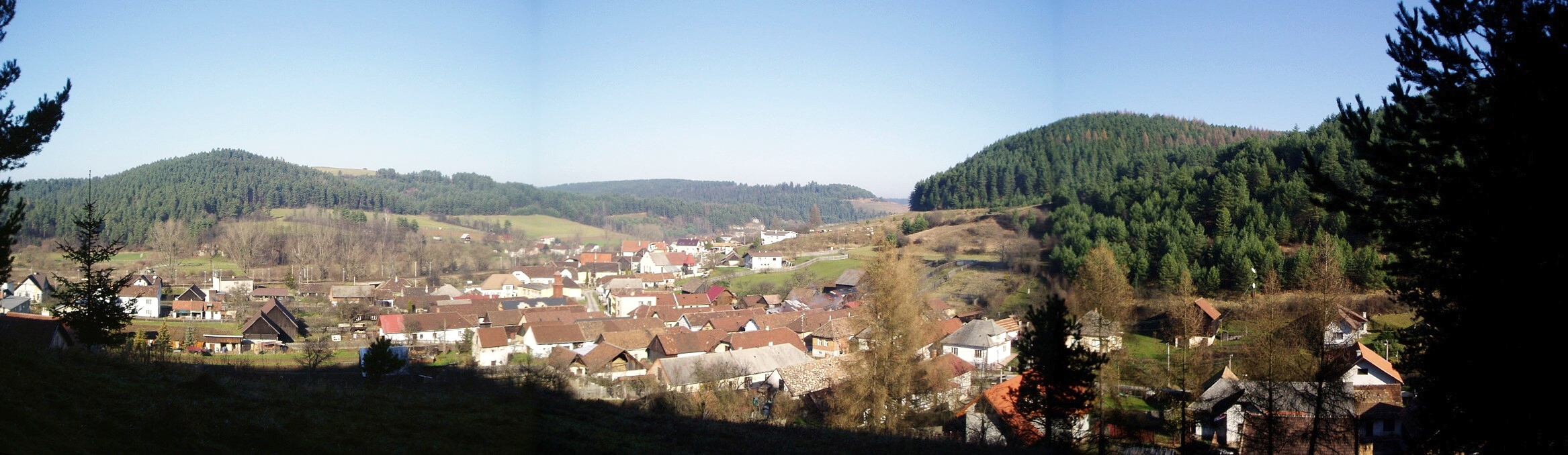 Matejovce nad Hornadom – panorama